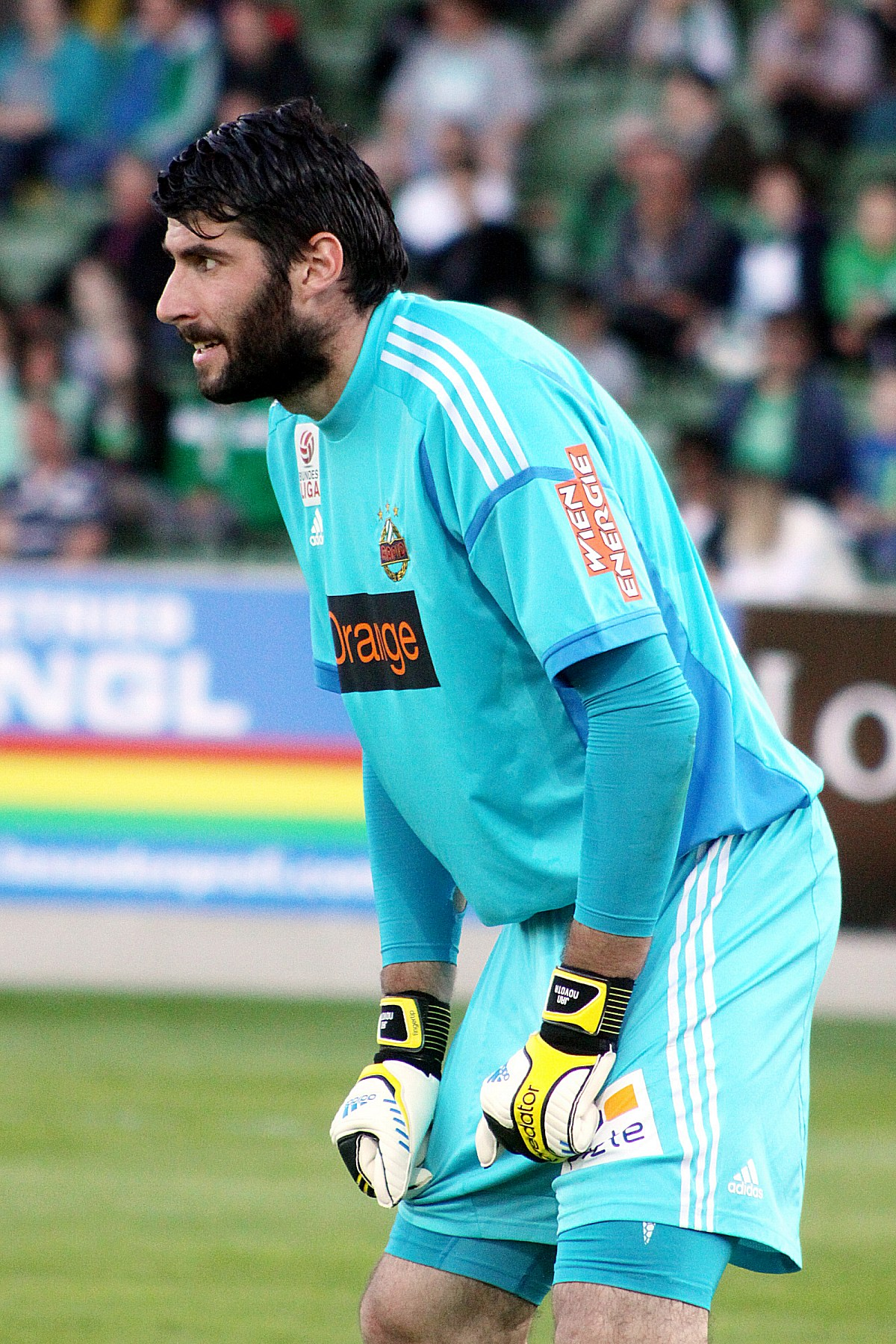 Meisterschaftsspiel der österreichischen Bundesliga: SV Mattersburg gegen SK Rapid Wien am 18. Mail 2013 (2:0)] im Mattersburger Pappelstadion.] - Das Foto zeigt den Torhüter des SK Rapid Wien Jan Novota.